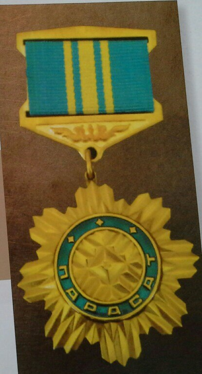 Қазақша (кирил): "Парасат" ордені